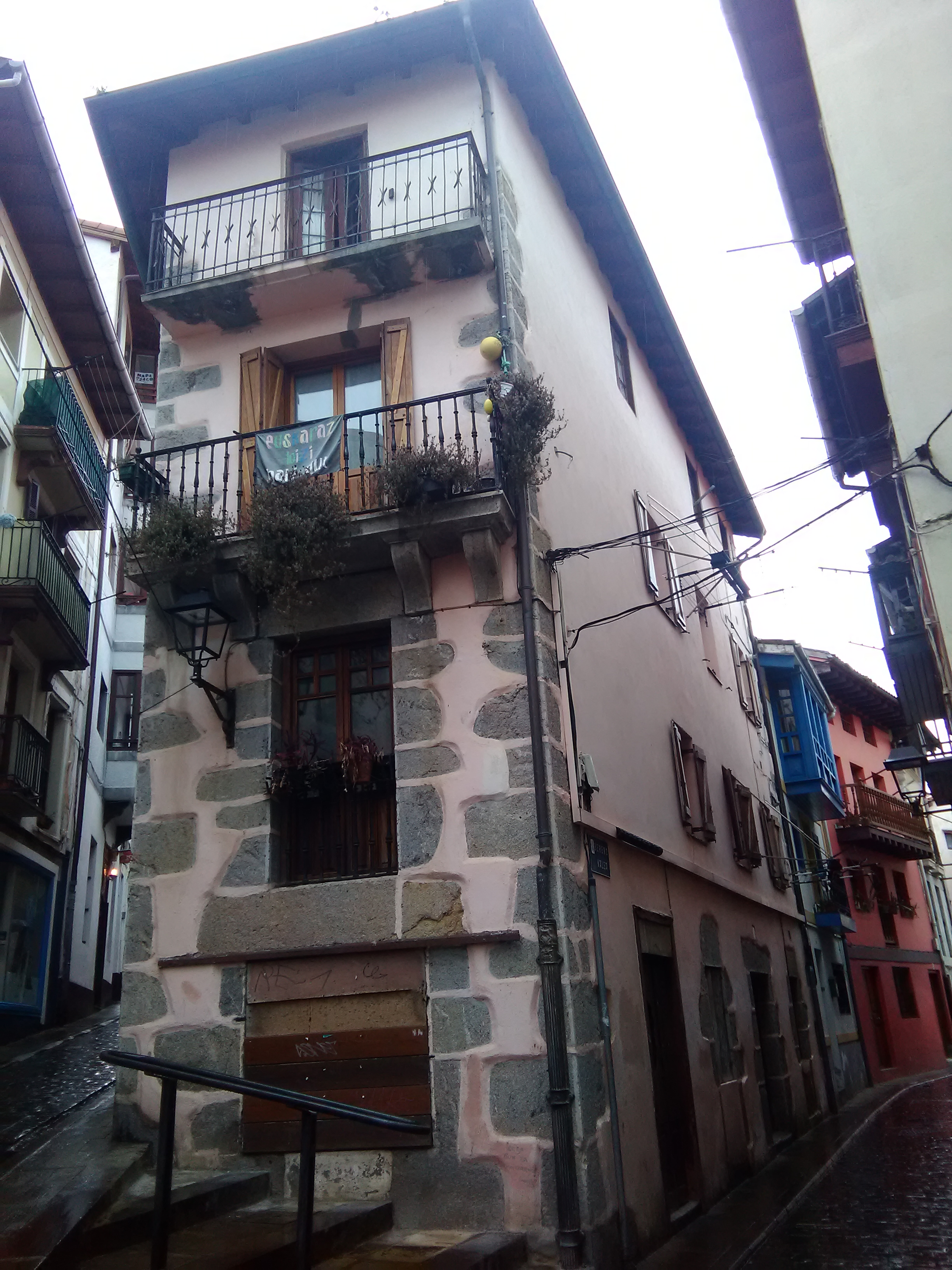 Casa-tienda al inicio de Beaskokalea (Lekeitio, España), adquirida por la "americana" Prudentzi Urizar a principios del s. XX.